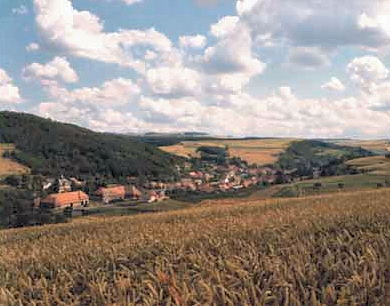 Ortsbild Finkenbach-Gersweiler